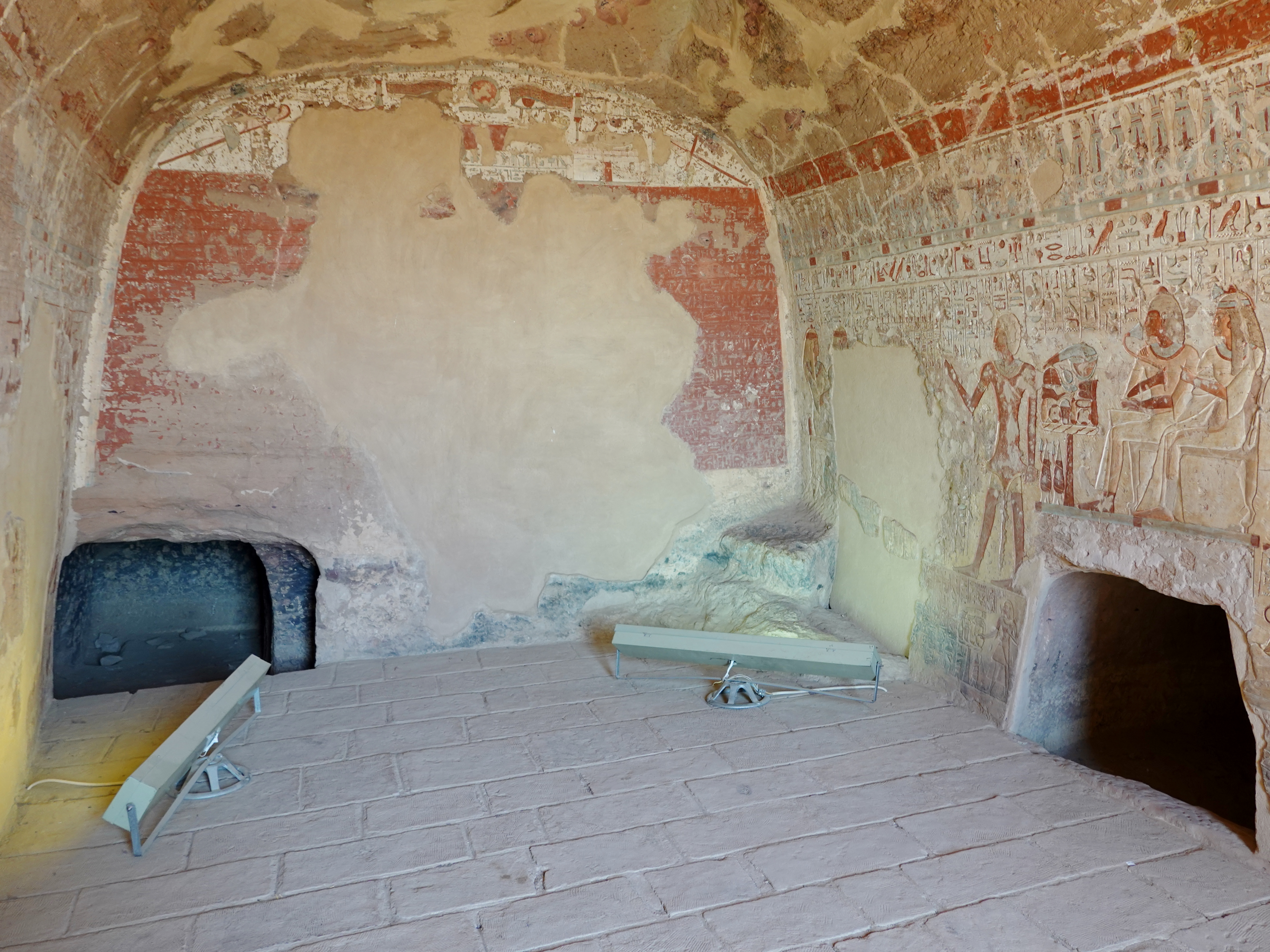 Felsengrab des Setau unter den Felsengräbern des altägyptischen Necheb bei el-Kab, Ägypten